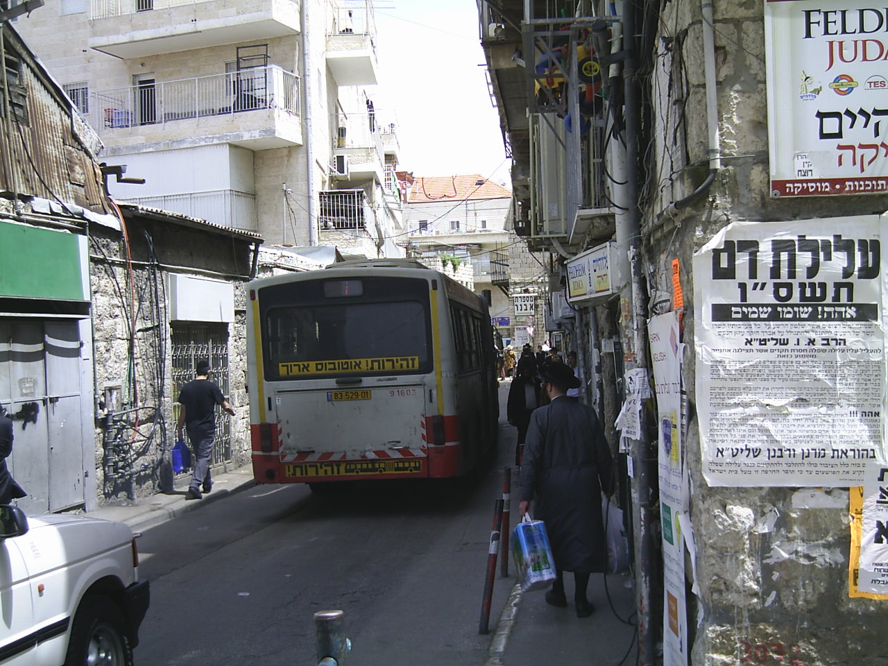 Meah Shearim, Jeruzalem.